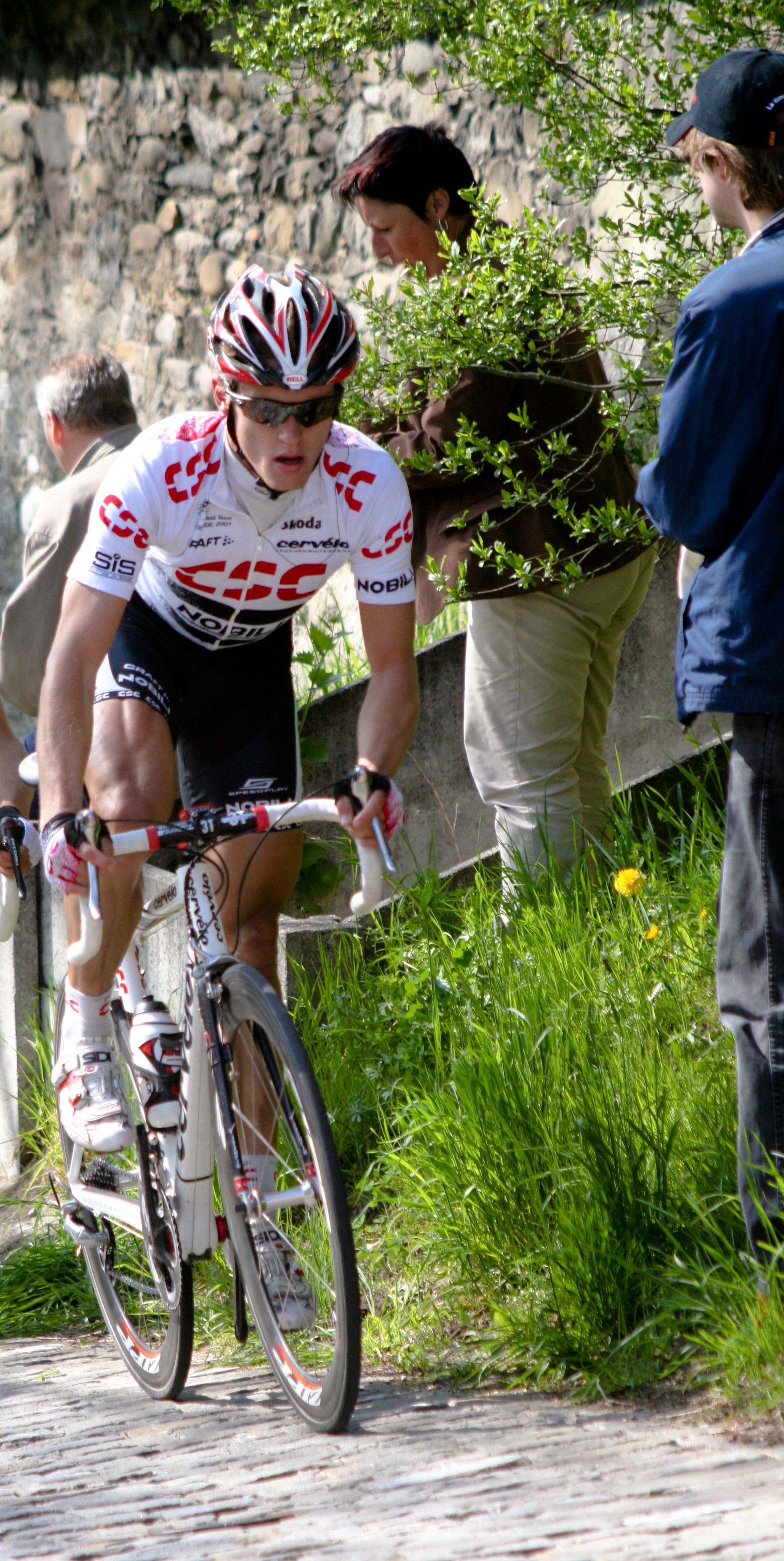 Matti Breschel lors de la seconde étape du tour de Romandie 2008. Cote de la Lorette à Fribourg.